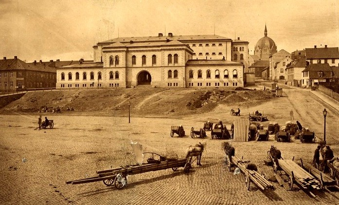 torg, brosten, hester, vogner, plankekjørere, plankelass, gatebelysning, politistasjon, fengsel, bygårder, Trefoldighetskirken. Fotografert før basarene, Youngstorget 6, ble oppført "under" Møllergata 19 i 1876-77.